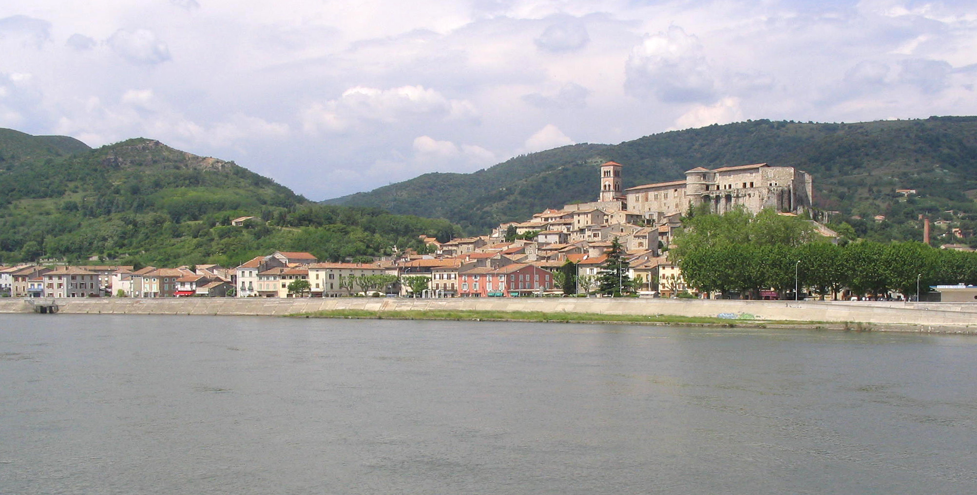 La Voulte vue de la rive gauche du Rhône